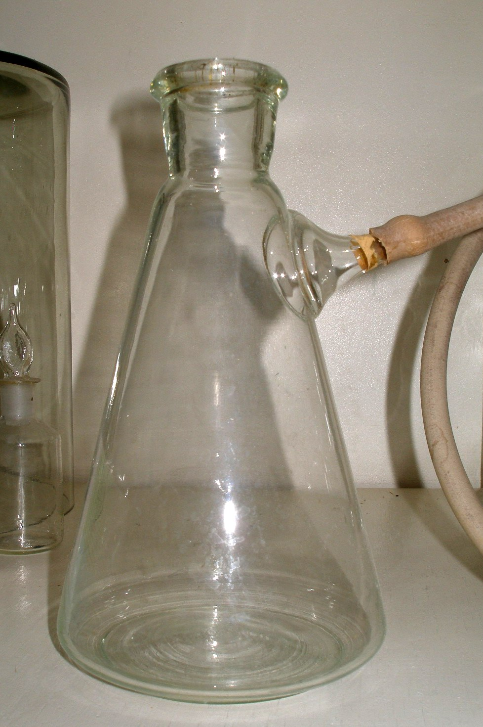 Bunzena kolba ar vakuuma caurulīti.